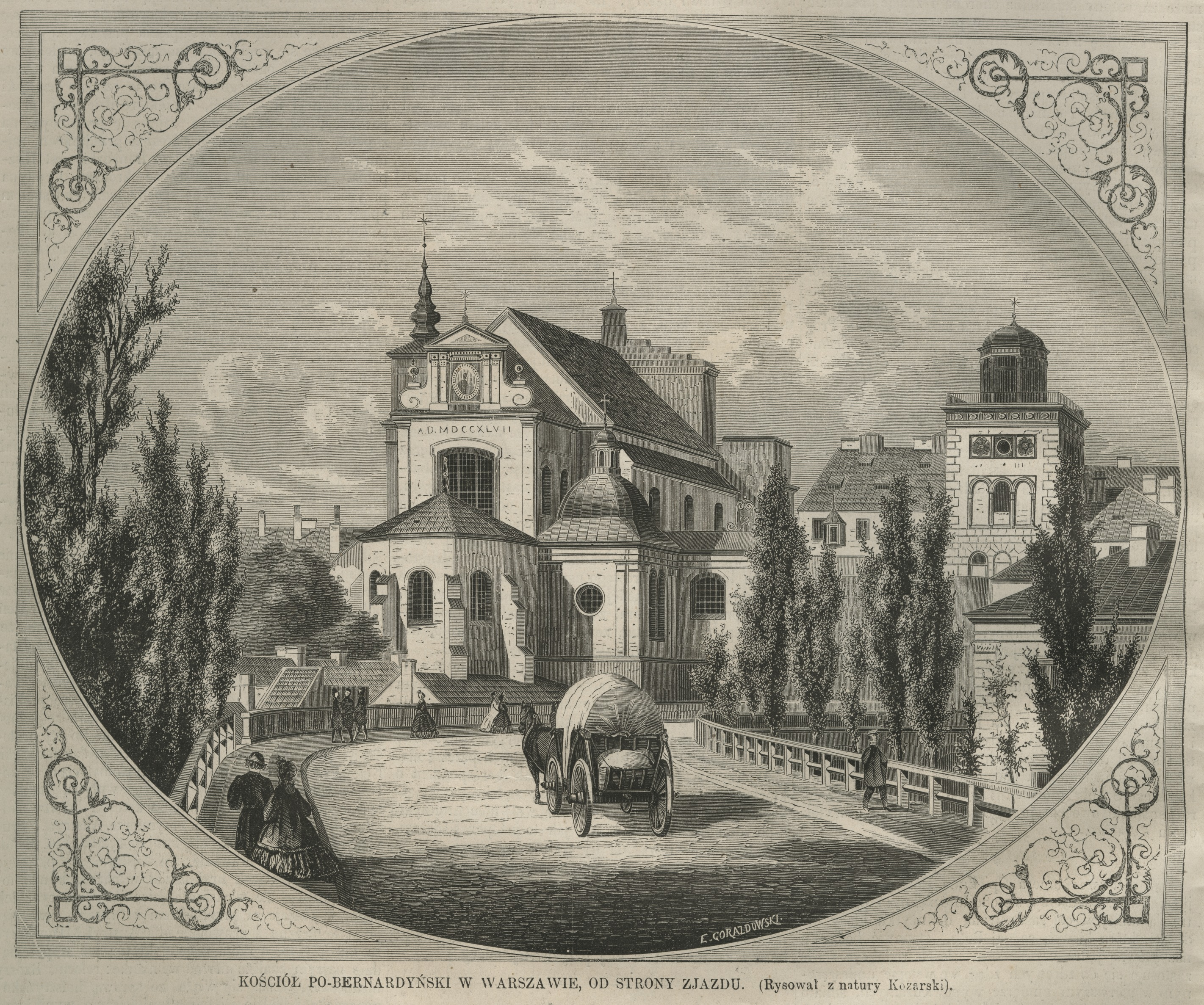 Kościół po-bernardyński w Warszawie, od strony zjazdu